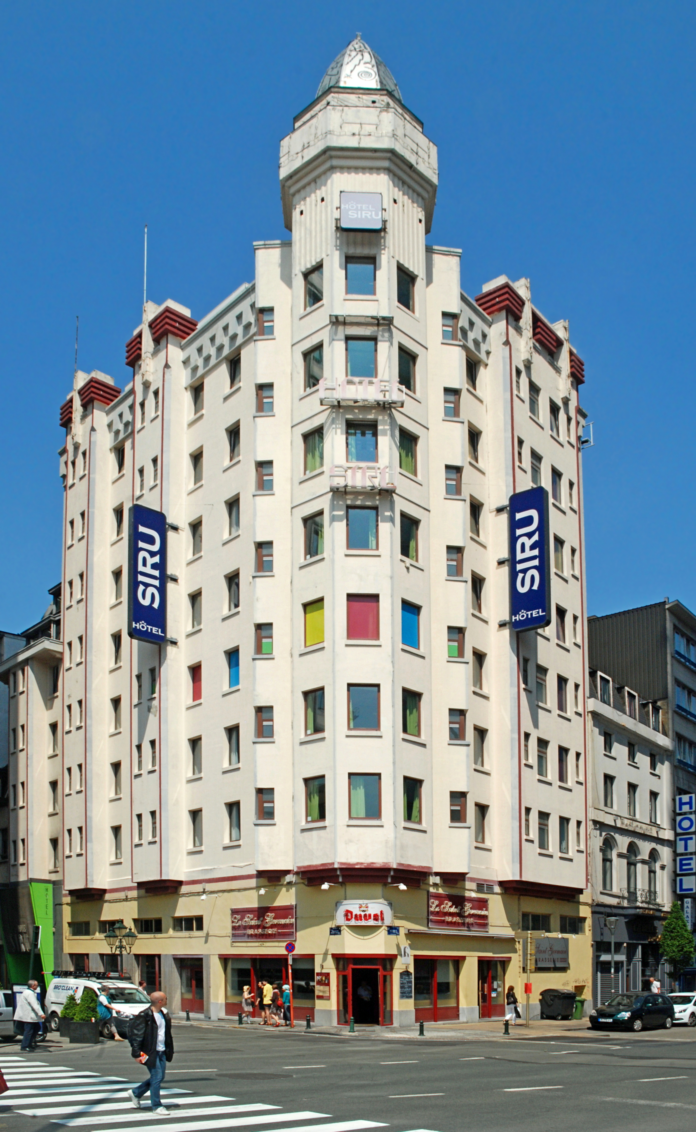 Belgique - Bruxelles - Nord Hôtel, devenu Hôtel Siru (Art déco / modernisme - Marcel Chabot 1932)